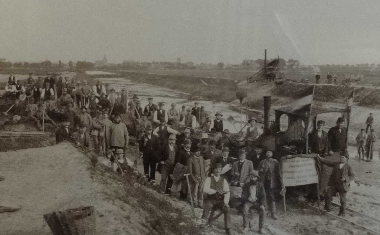 Bauarbeiten am Güstrow-Bützow-Kanal in den Jahren 1895/96.